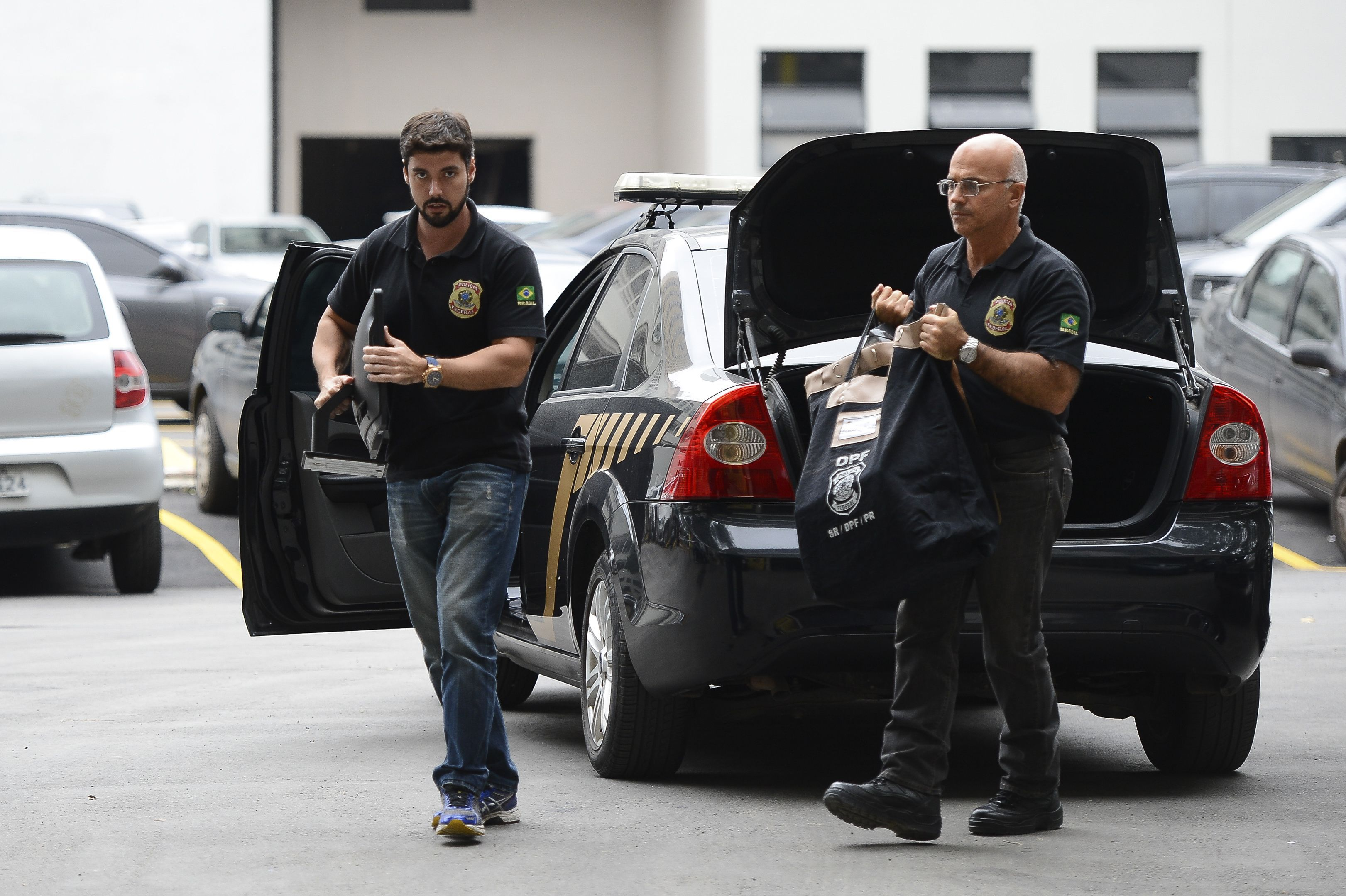 Computadores e malotes apreendidos na 30ª. fase da Operação Lava Jato, a Operação Vício, sendo entregues na sede da Polícia Federal, no Rio de Janeiro.